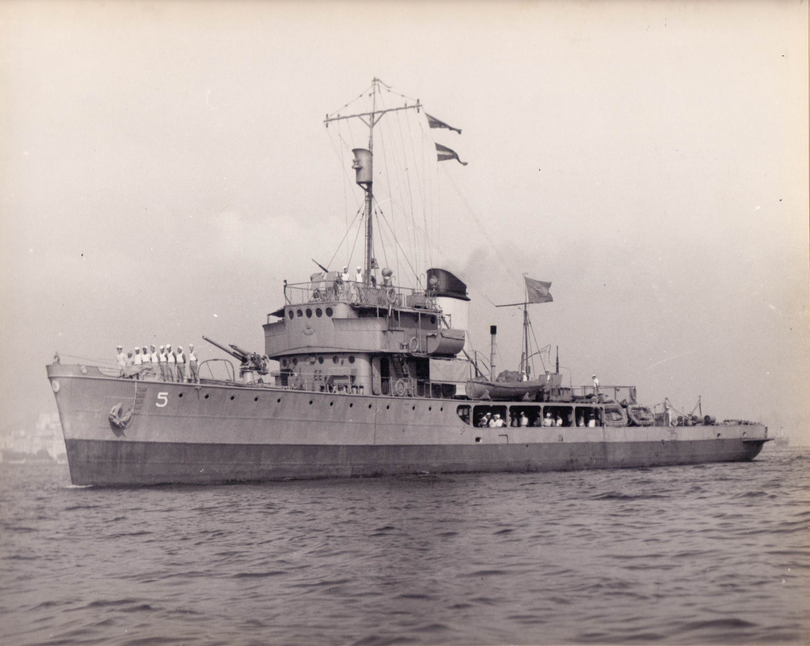 Arquivo liberado pela Marinha do Brasil através de projeto GLAM com Wiki Educação Brasil